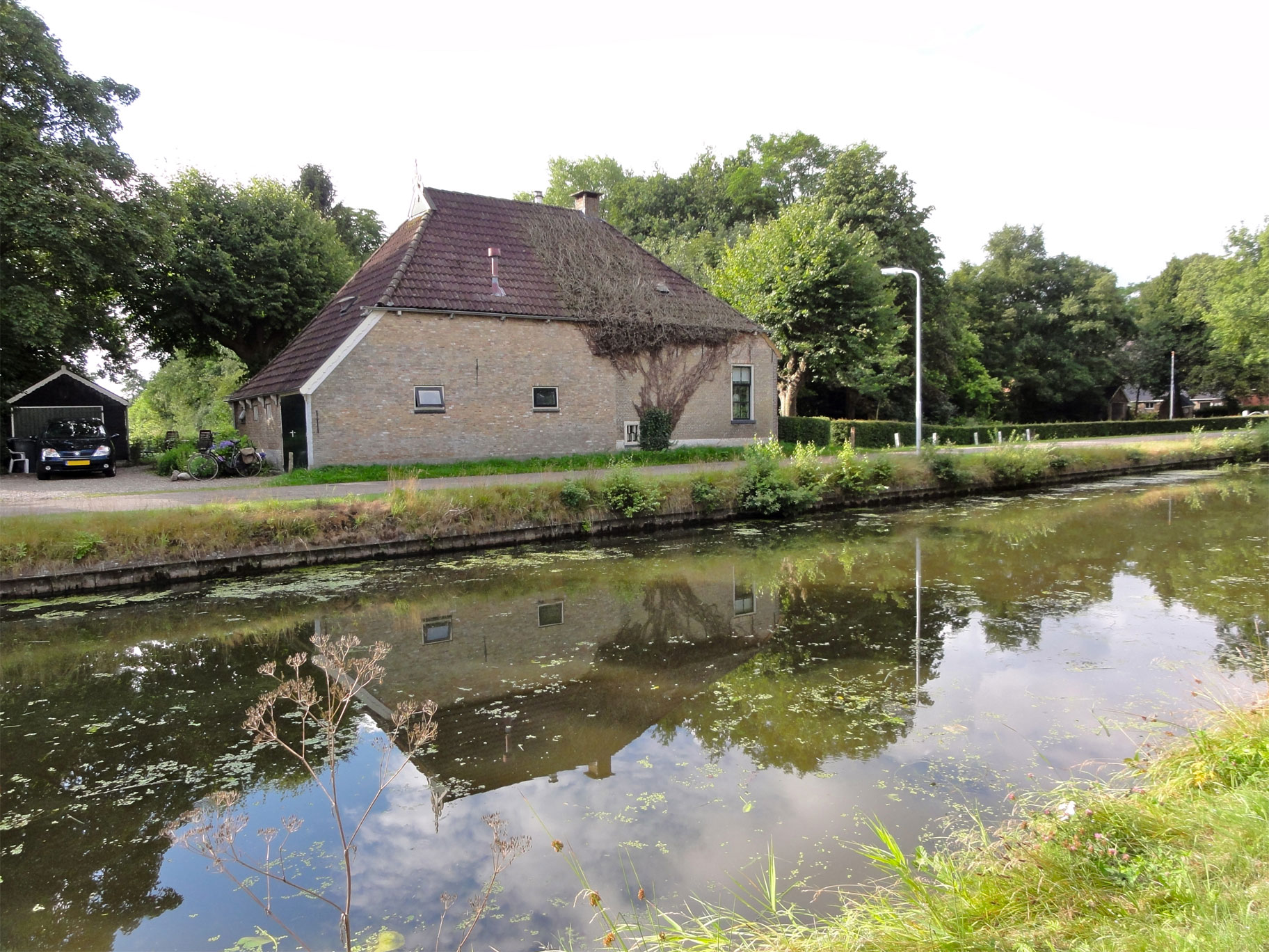 Boerderij aan de Opsterlandse Compagnonsvaart nabij Hemrikerverlaat